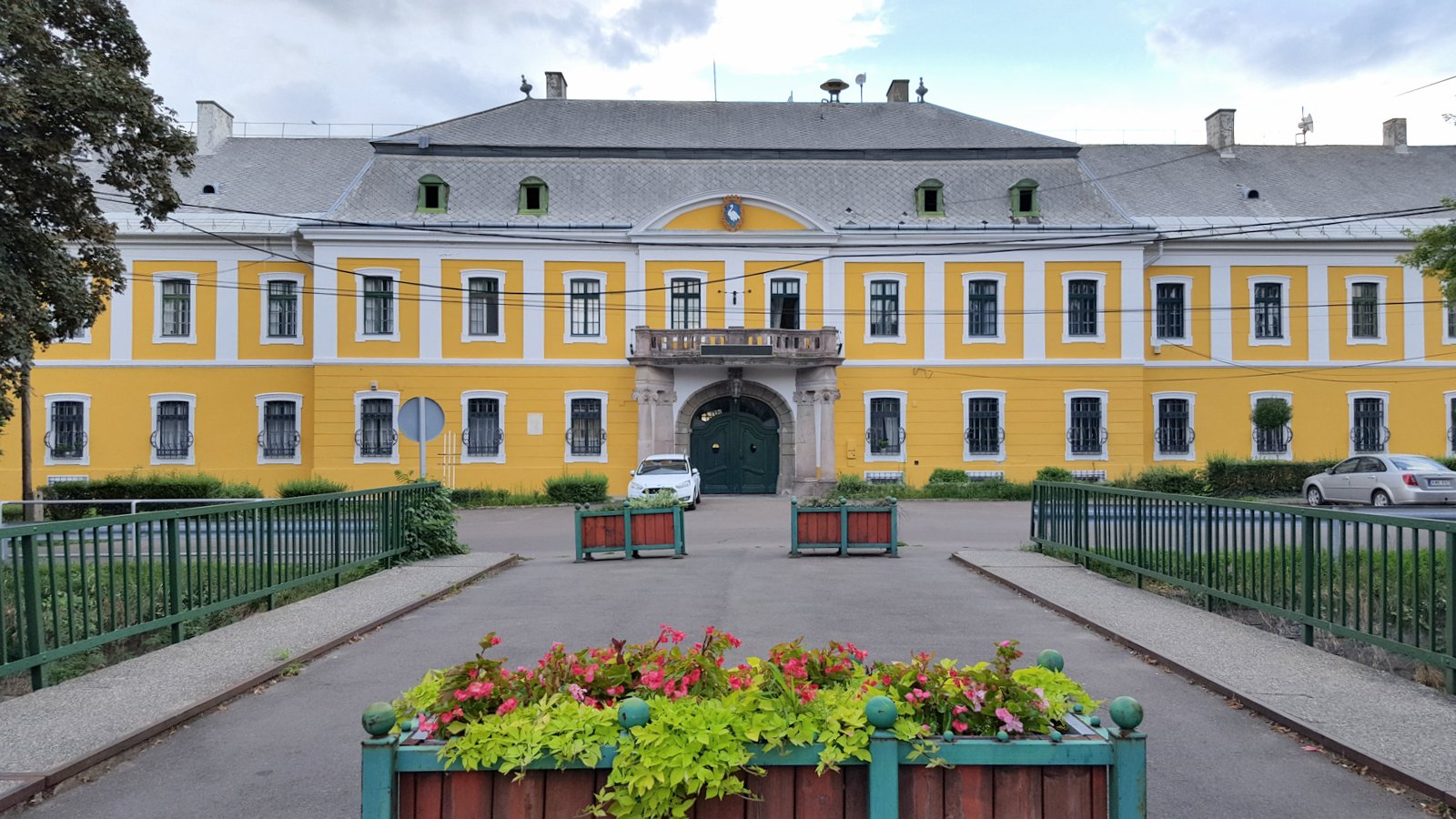 Vármegyeház, Gyöngyös